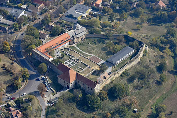 A pécsváradi vár légi fotón